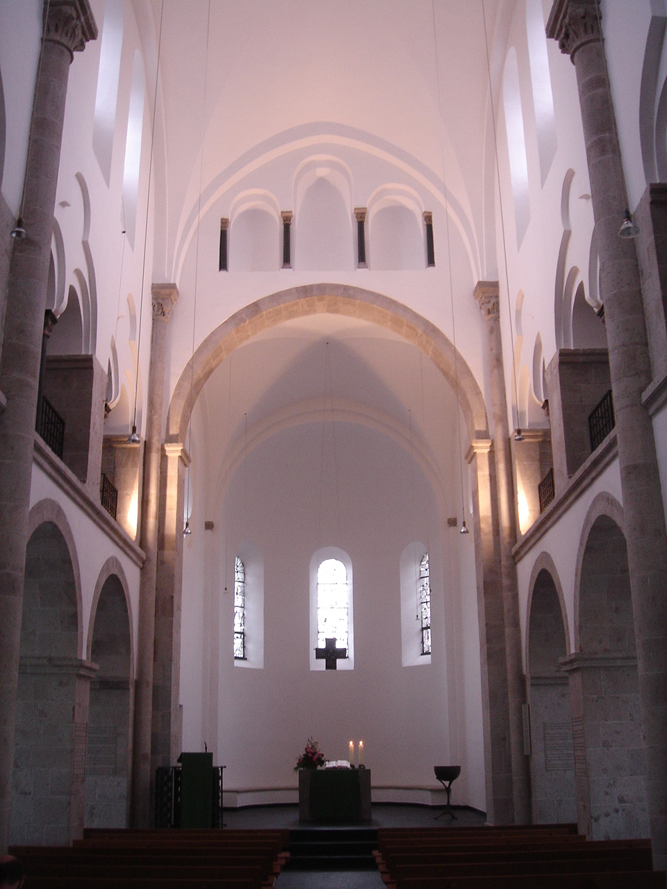 Reformationskirche Hilden, Blick in den Chor.